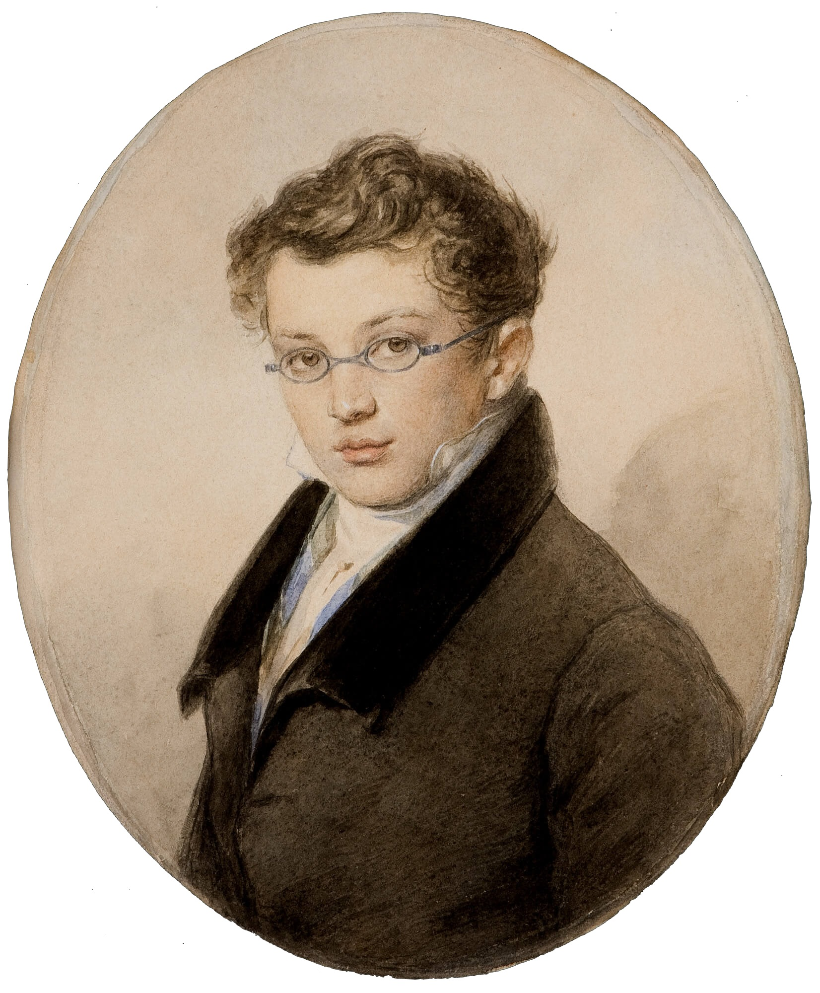 Дмитрий Николаевич Свербеев (1799-1874)